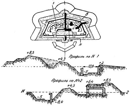 Типовой проект форта "Казённый двухвальный"